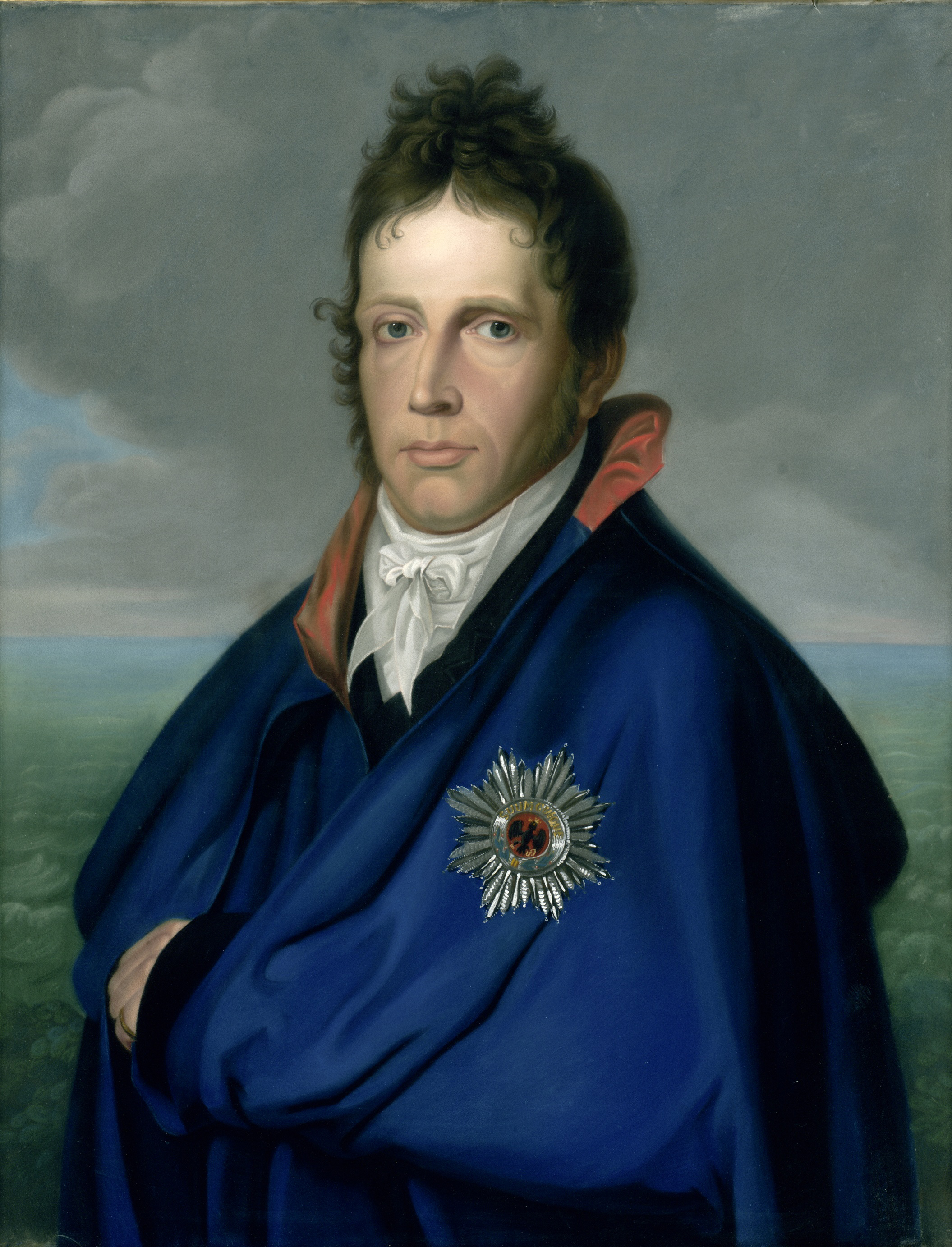 Willem Frederik (1772-1843), erfprins van Oranje-Nassau. Later koning Willem I. Voorstelling genaamd 'Het mantelportret'. Ten halven lijve naar links, aanziend. Op de achtergrond een zee. Onderdeel van de collectie pastels.